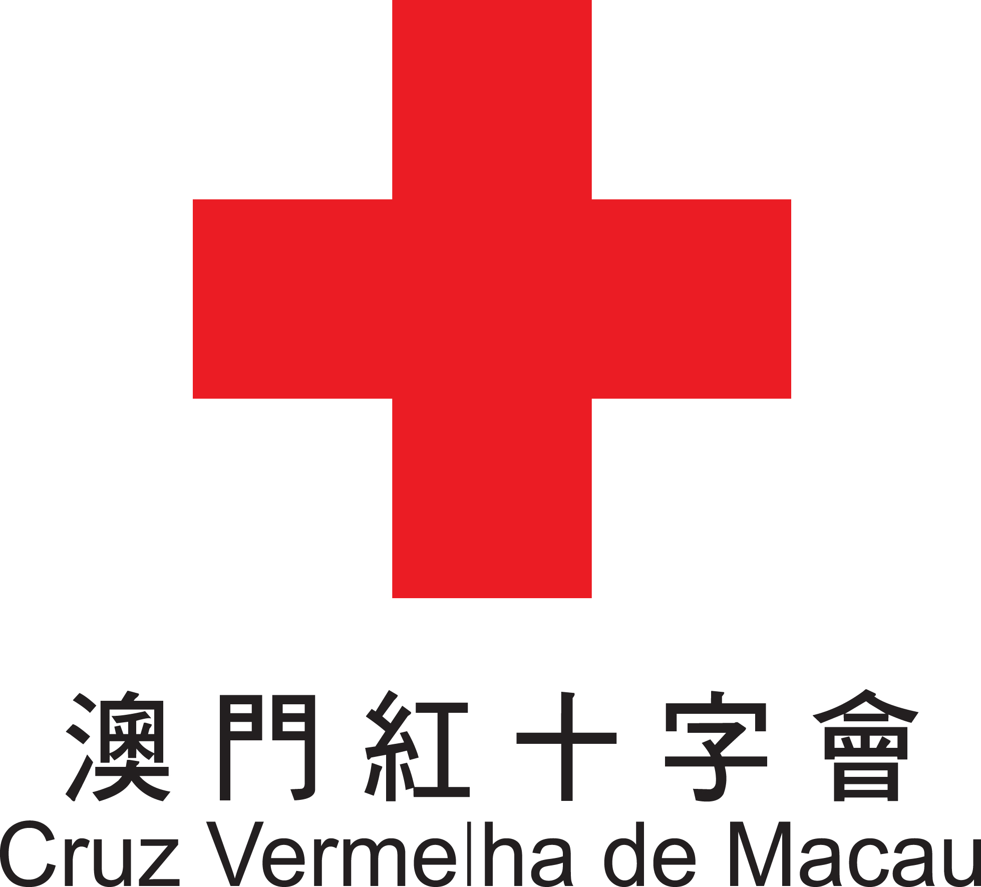 Cruz Vermelha de Macau